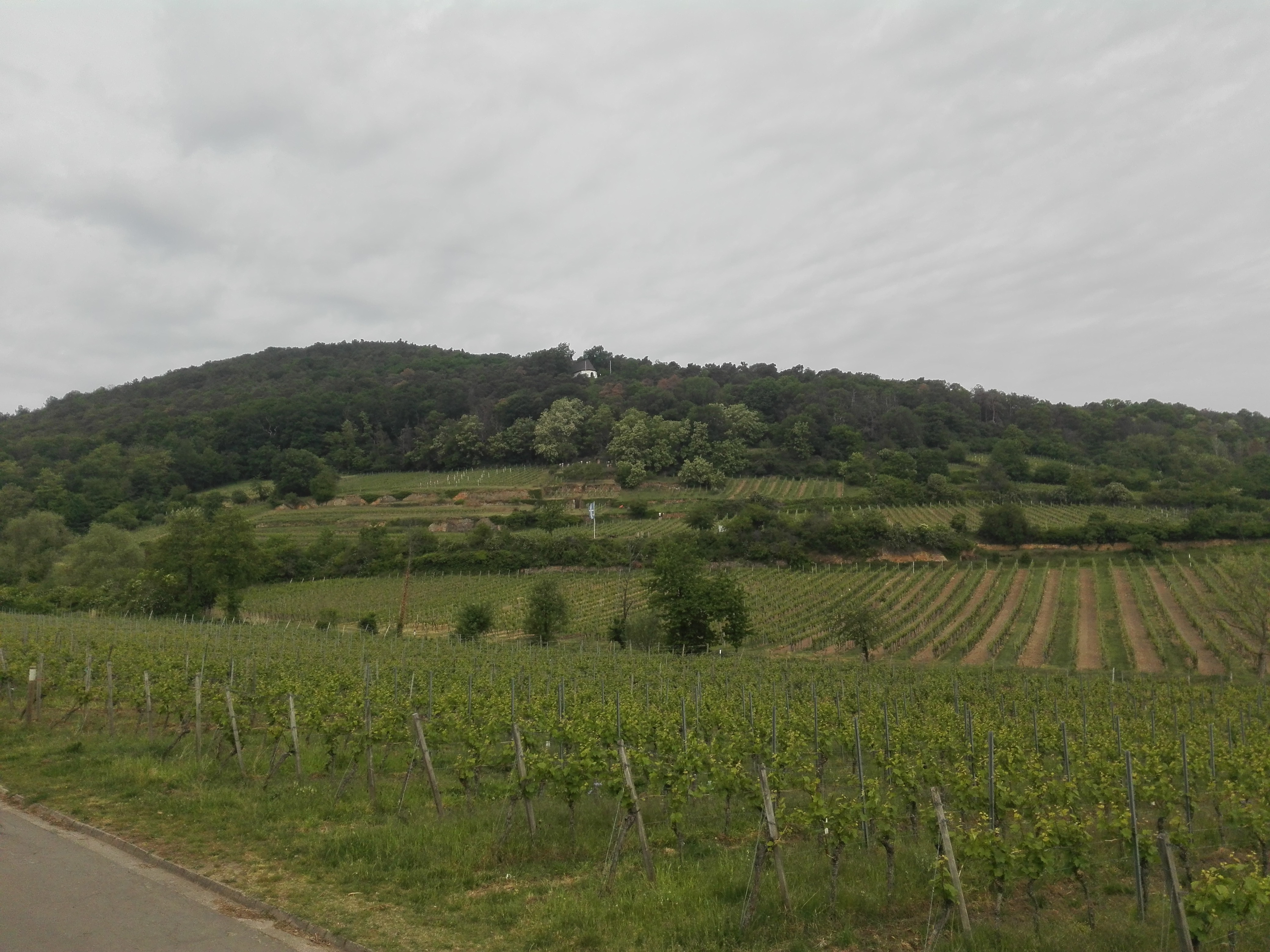 Der Kirchberg bei Deidesheim bildet den Ostrand der Haardt zur Oberrheinischen Tiefebene hin. Auf der Hangnase steht die Michaelskapelle.